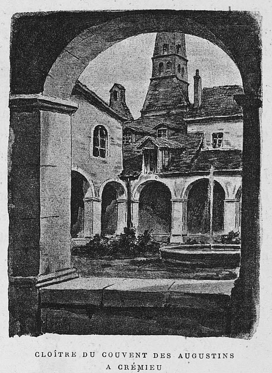 Aux environs de Lyon / Monsieur Josse ; préface de M. Coste-Labaume ; édition illustrée de 250 dessins de J. Drevet.